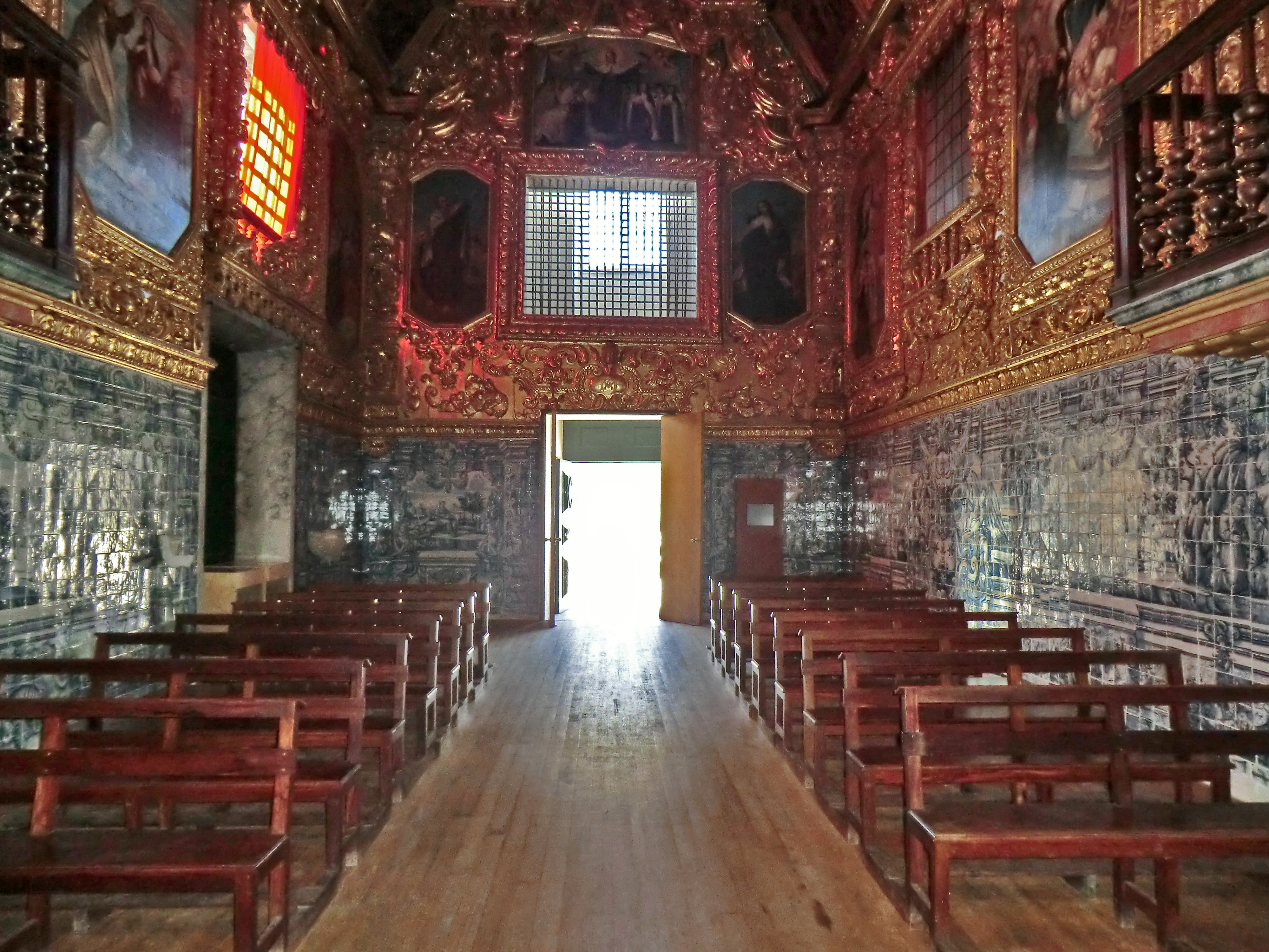 Igreja das Carmelitas ou Igreja de São João Evangelista This file was uploaded for Wiki Loves Monuments in Portugal with the unique identifier 71150.